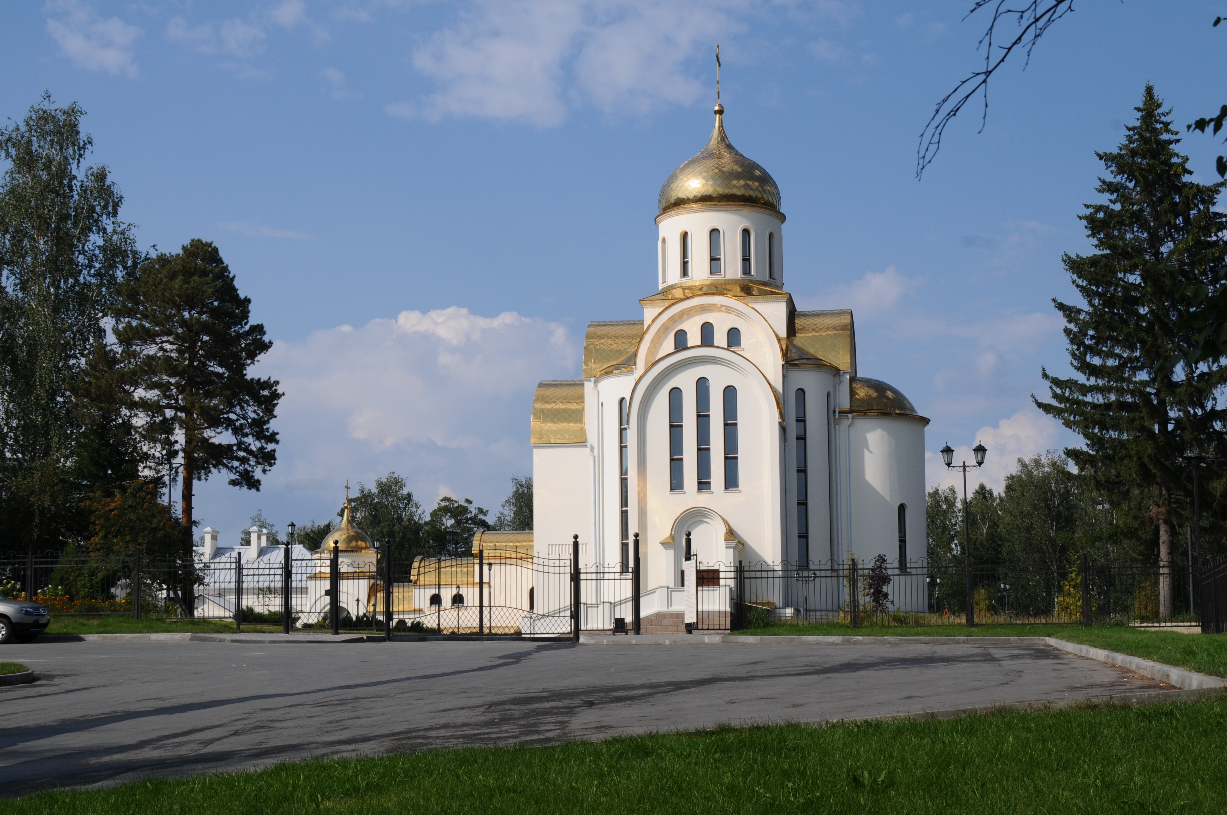 Храм Покрова Пресвятой Богородицы в городе Озерске